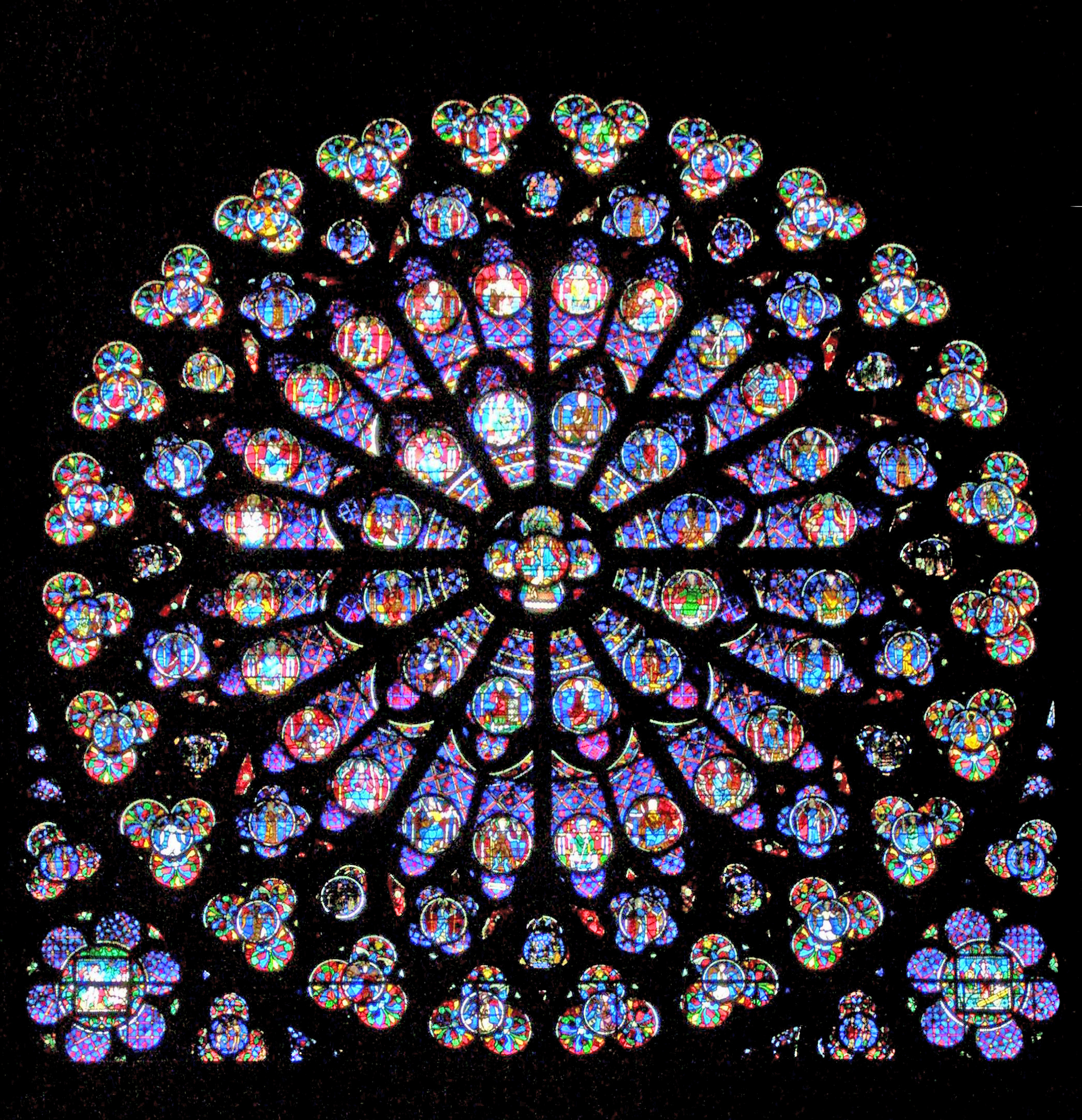 Rosace sud de la Cathédrale Notre-Dame de Paris